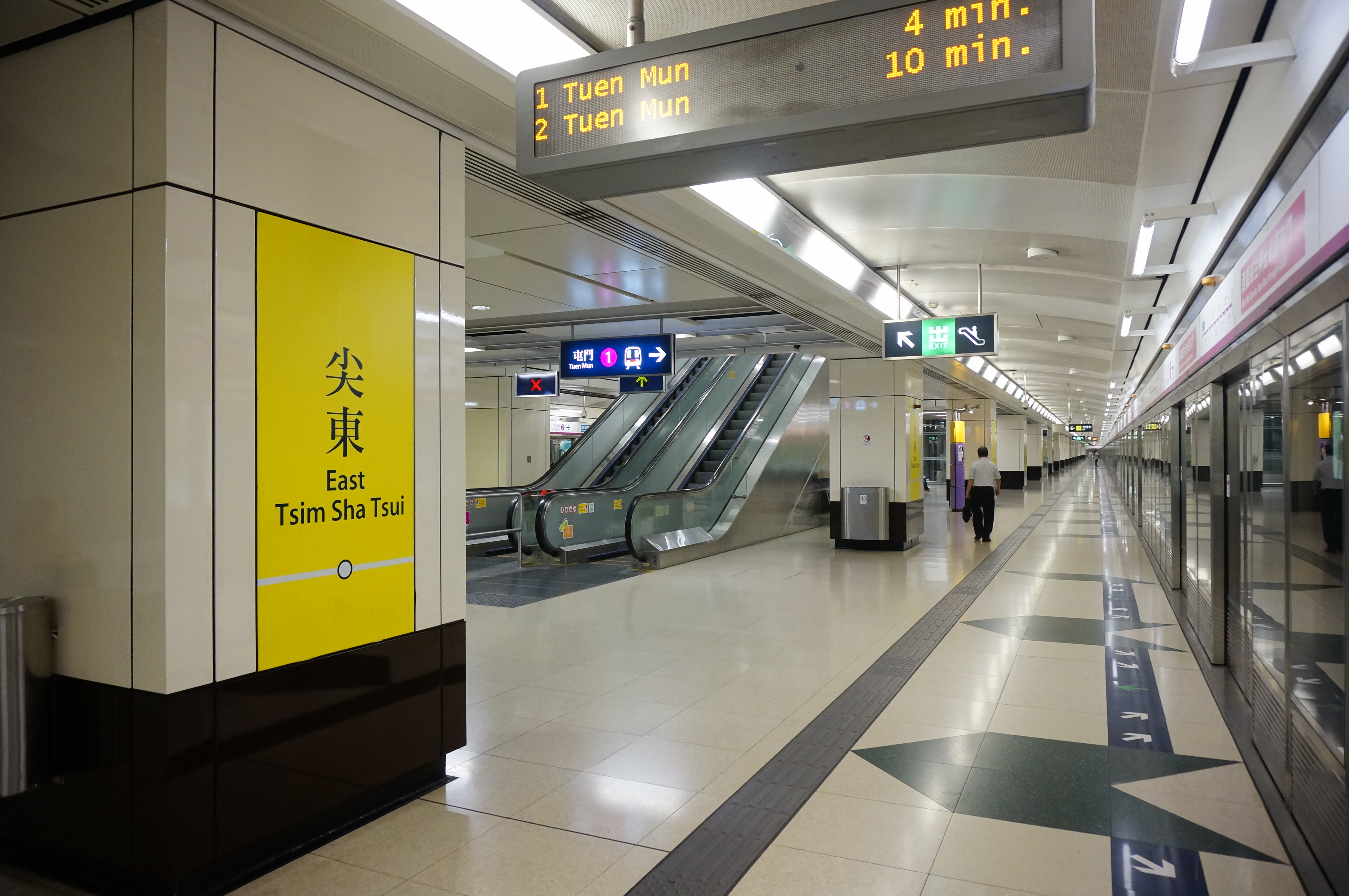 港鐵尖東站月台